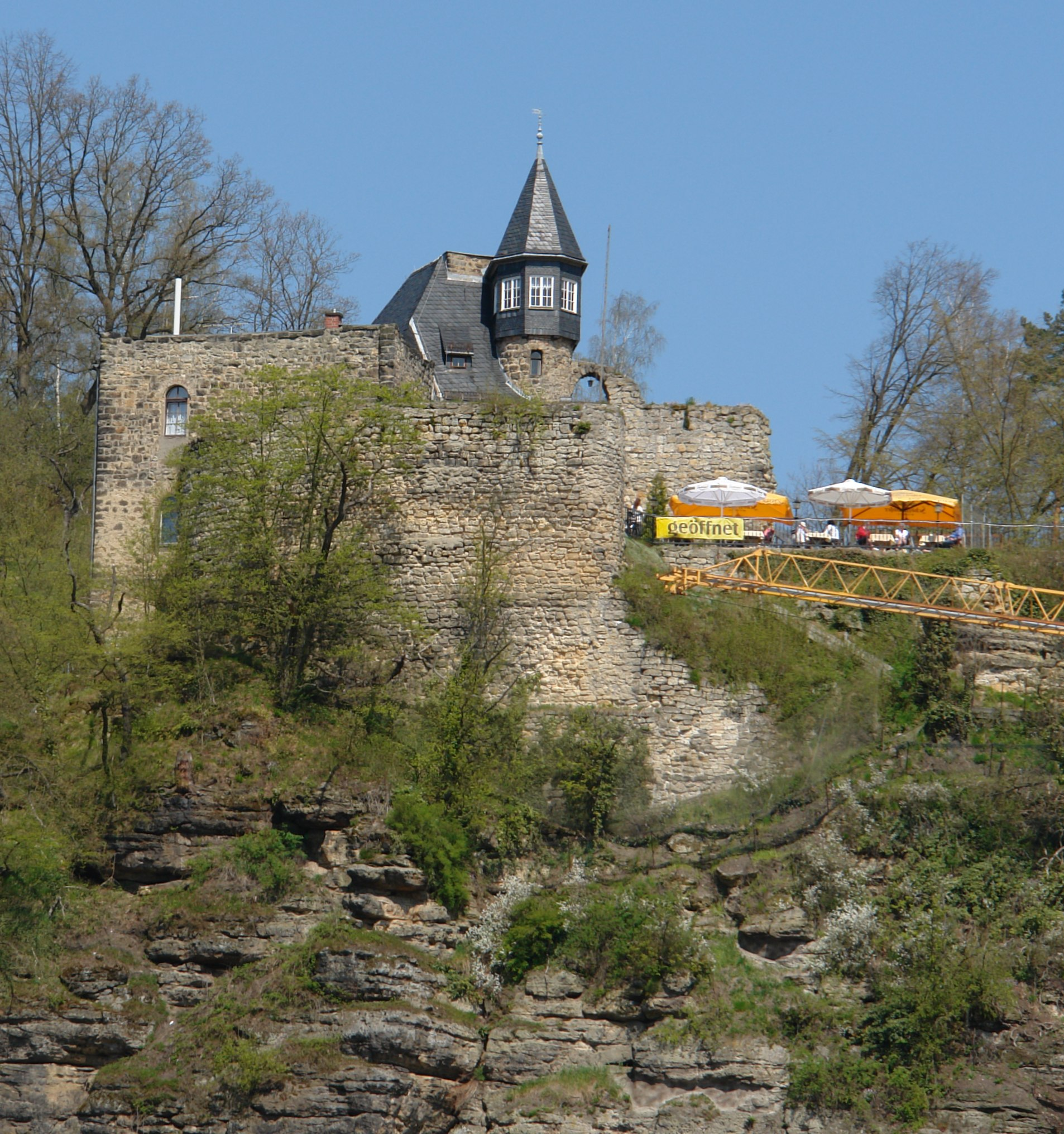 Burg Altrathen